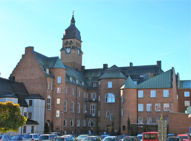 Stadshuset i Nässjö Baksidan oktober 2013